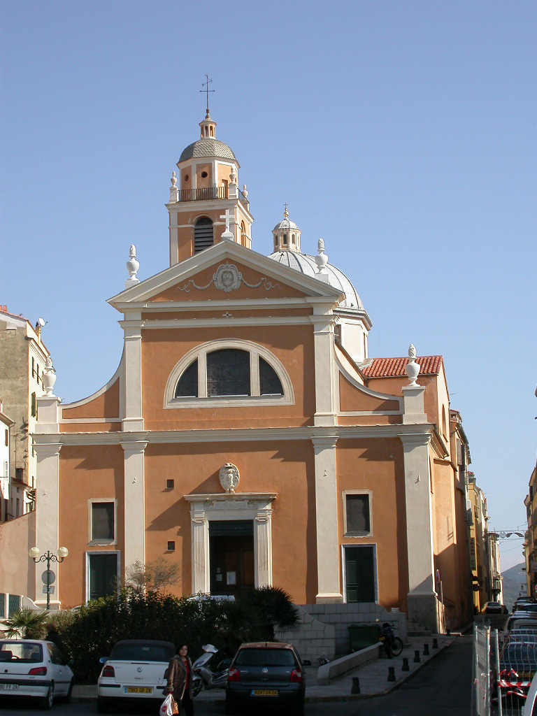 Corse Cathédrale D'Ajaccio